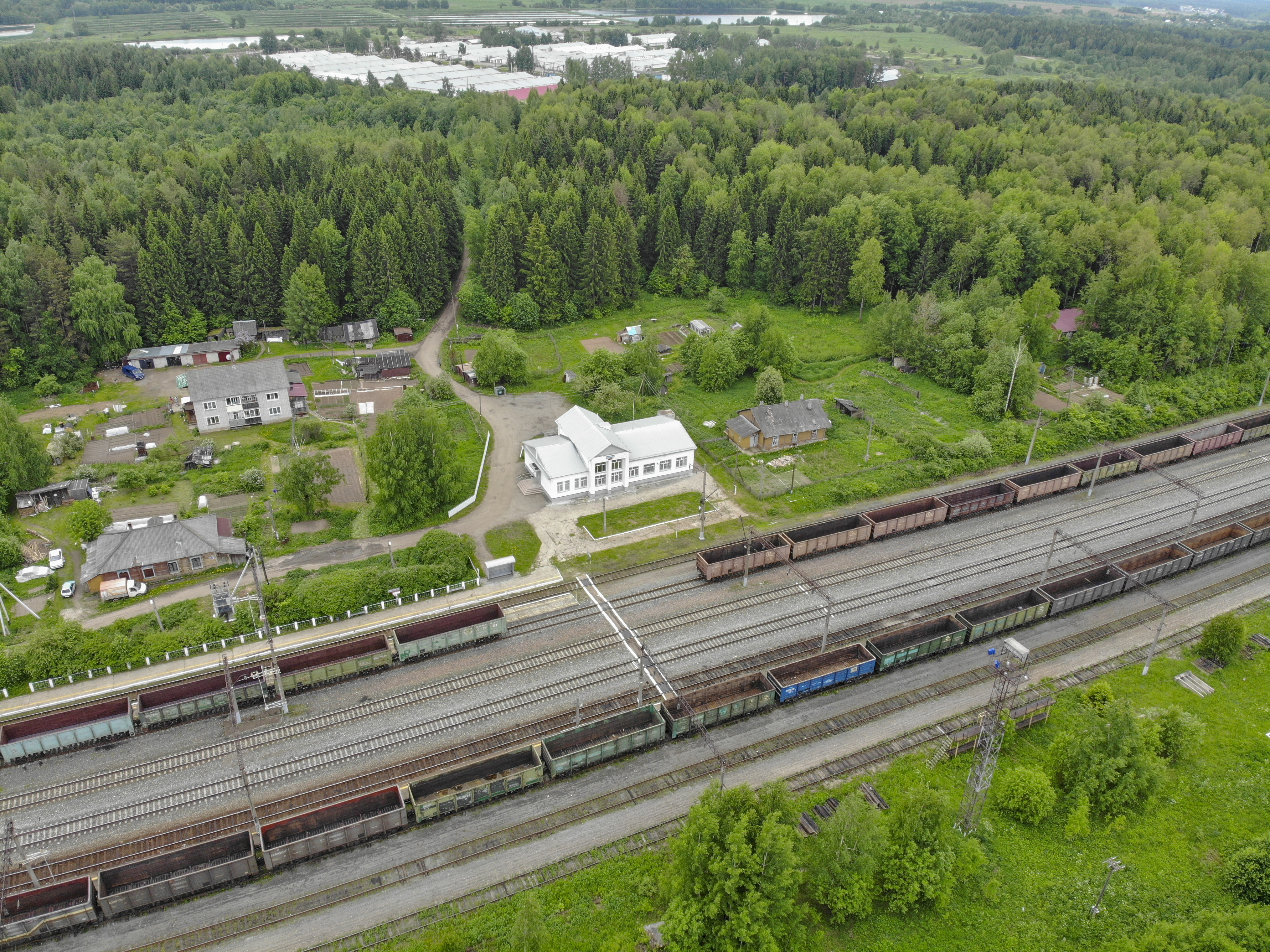 Станция Чухломинский - вид с высоты.